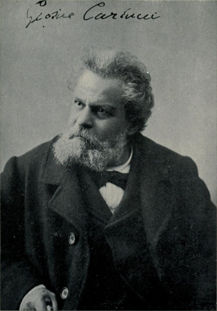 Giosuè Carducci